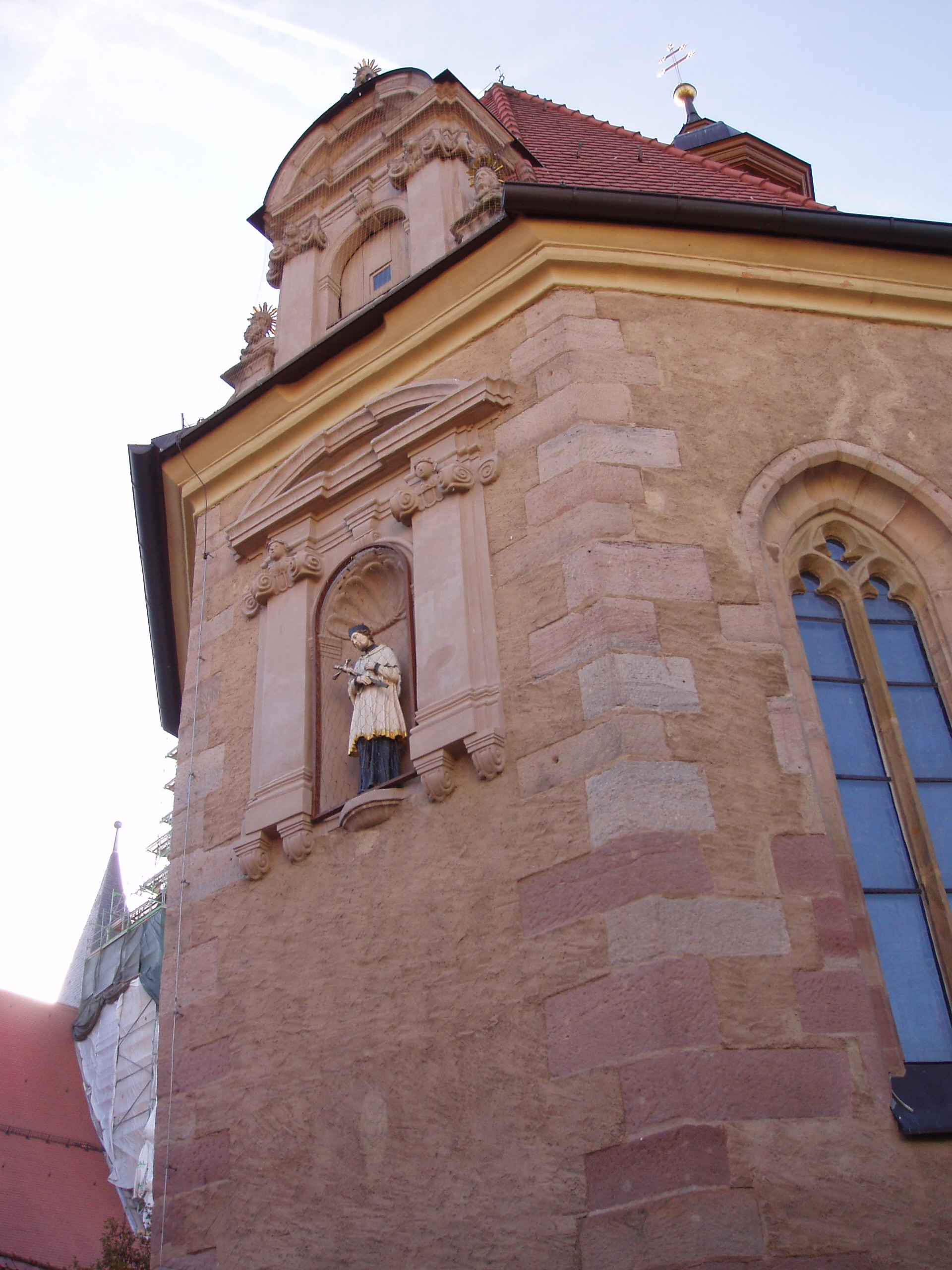 Liebfrauenkirche Herrieden, Detail